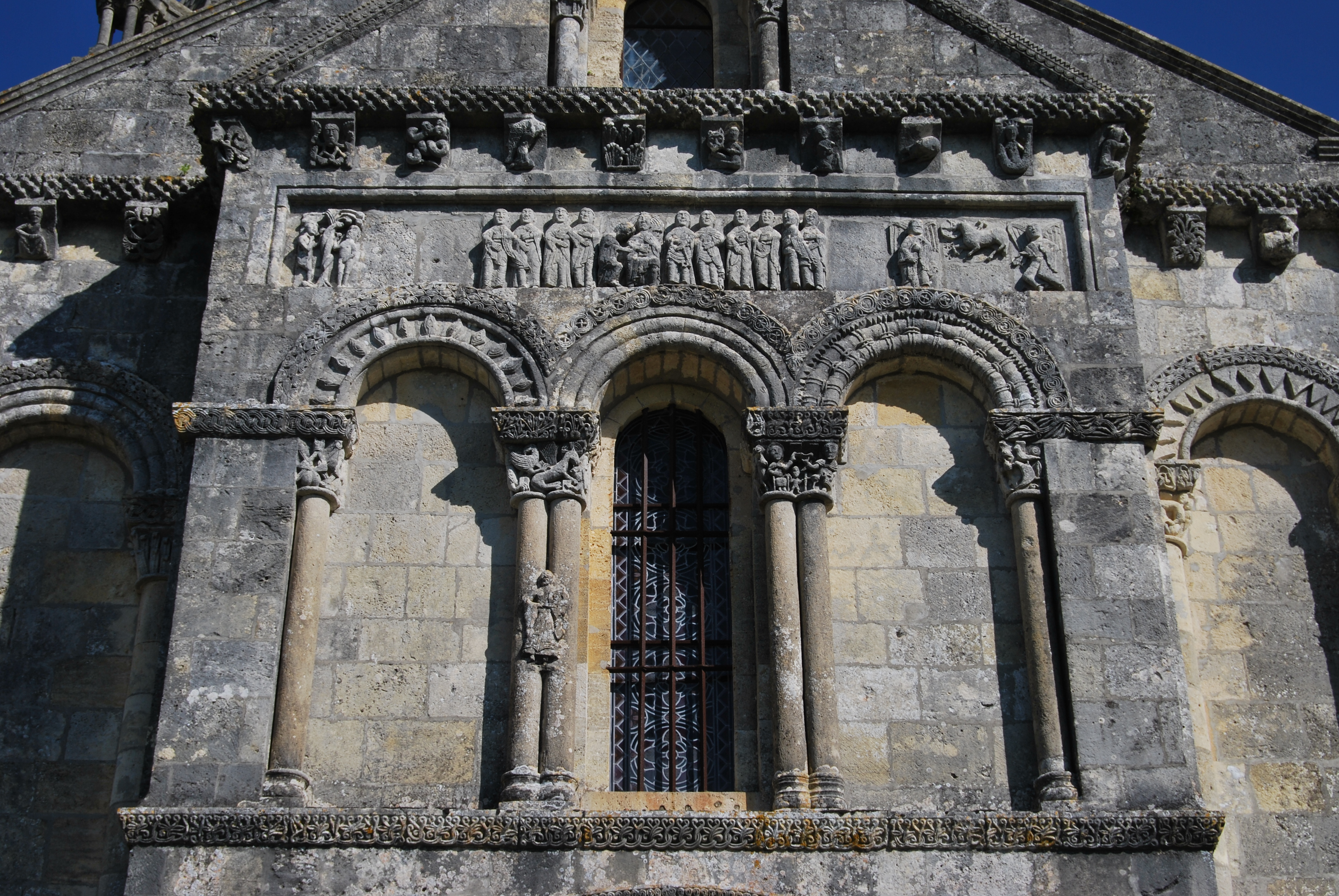 Église Saint-Pierre de Loupiac